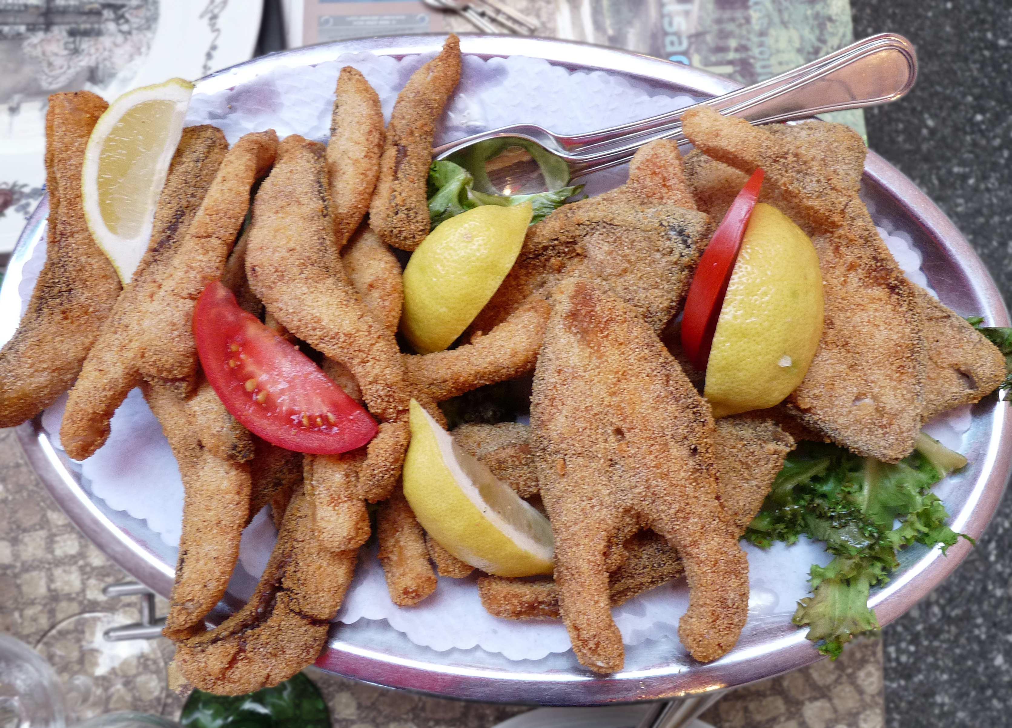 La carpe frite, une spécialité du Sundgau (Alsace). A gauche des filets, à droite des darnes. Ferrette (Haut-Rhin)